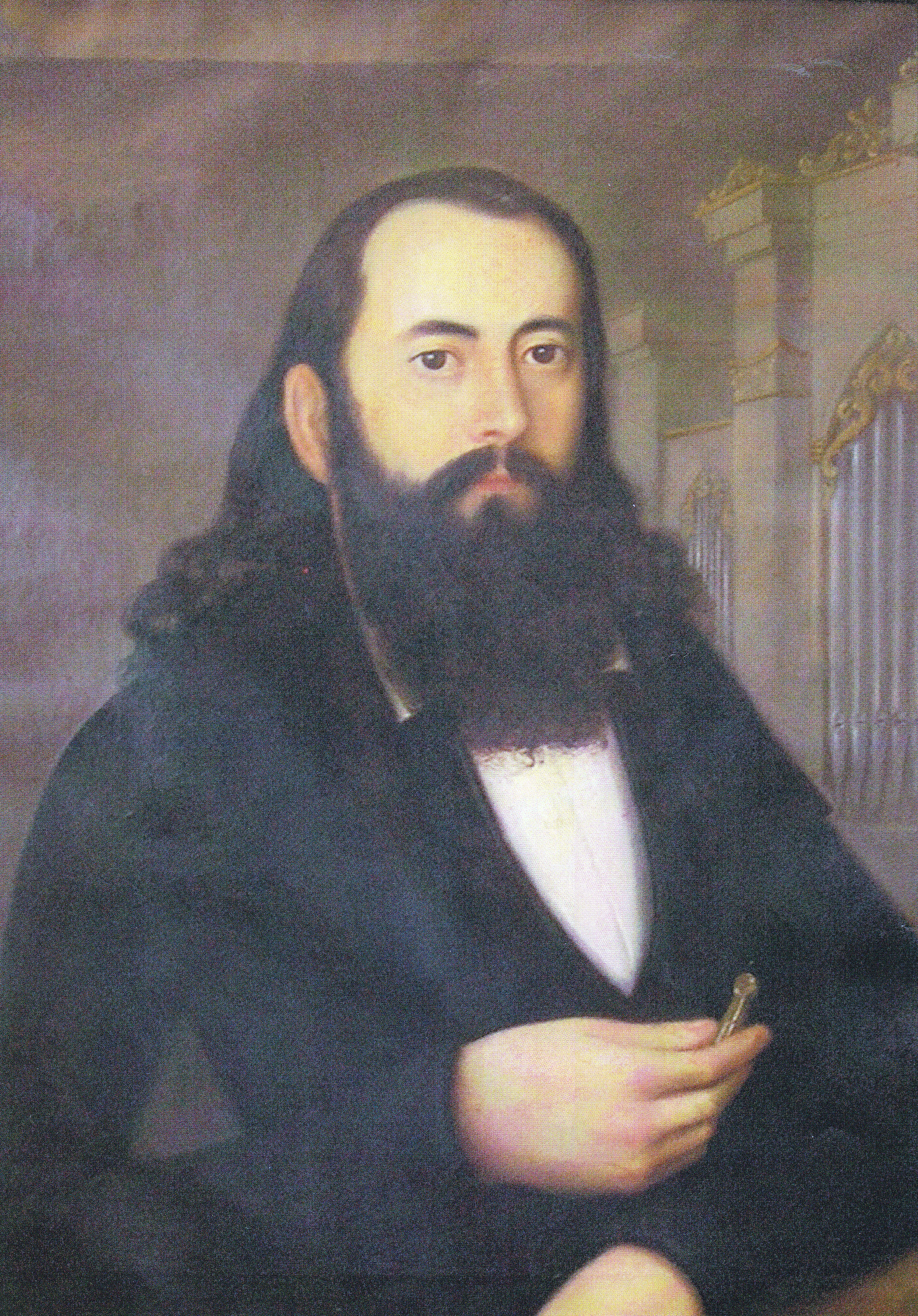 Portrait Ludwig Mooser (Ölbild)